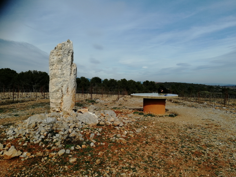 Mehir Pierre Blanche et table d'orientation des Vins AOC du Minervois